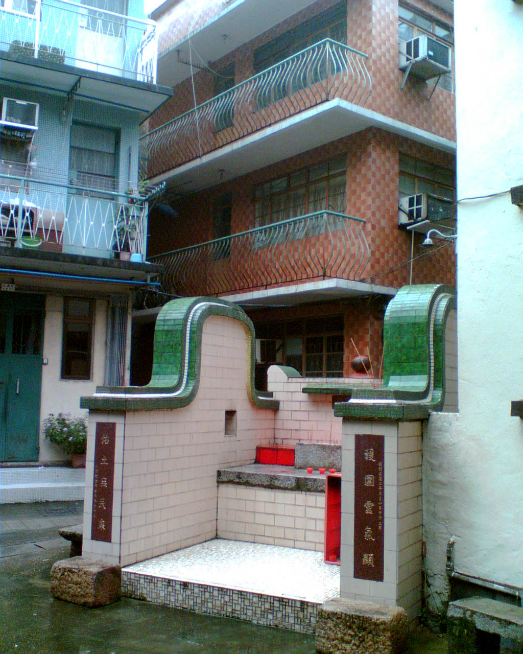 大圍土地